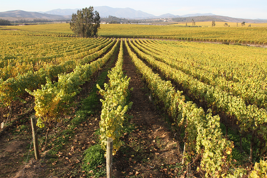 Campos de leyda